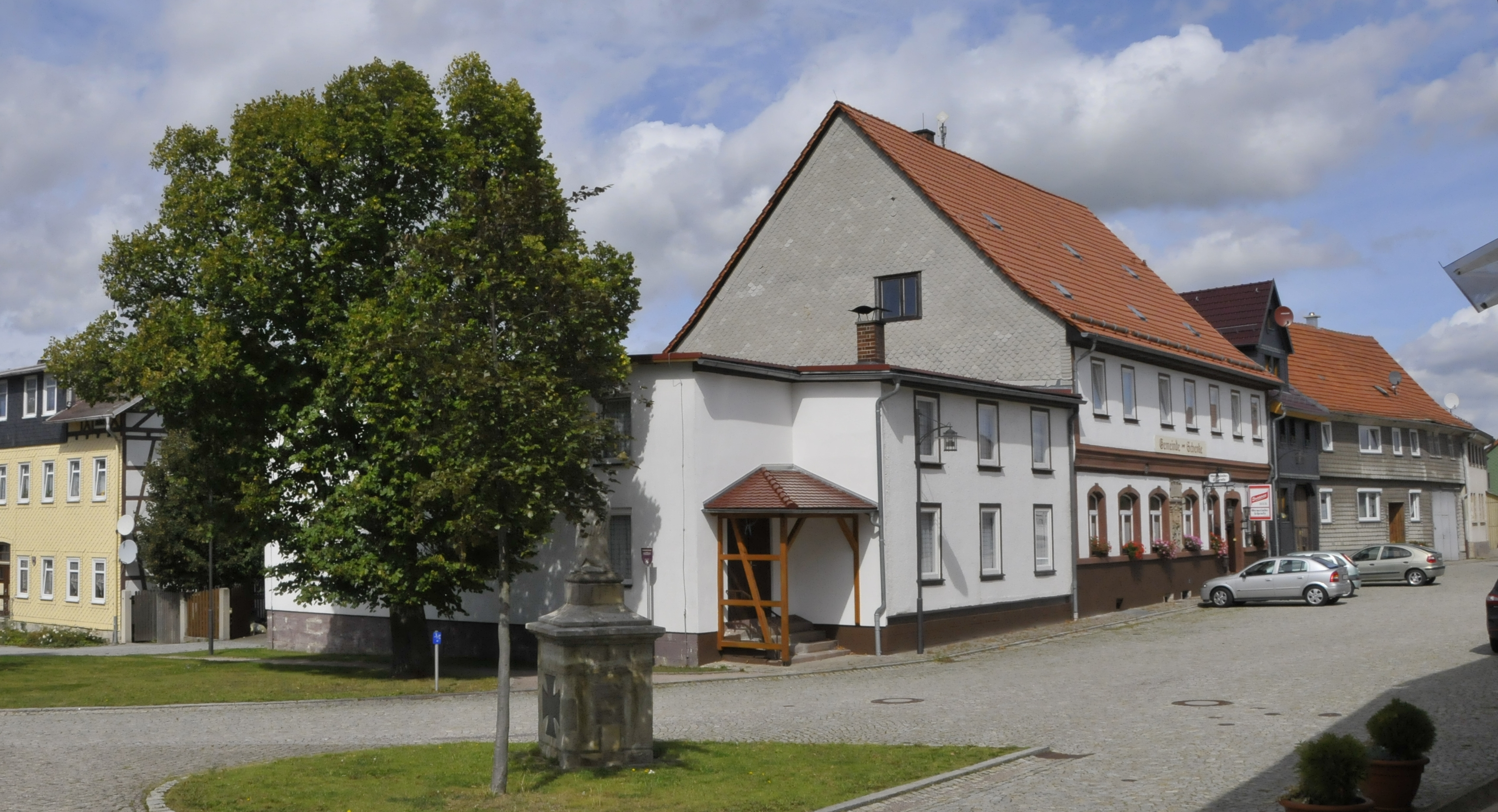 Crawinkel, Marktplatz